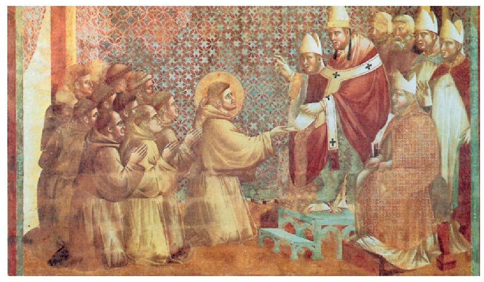 San Frantziskoren erregelaren sendotza. XIII. mendearen amaierako pintura.